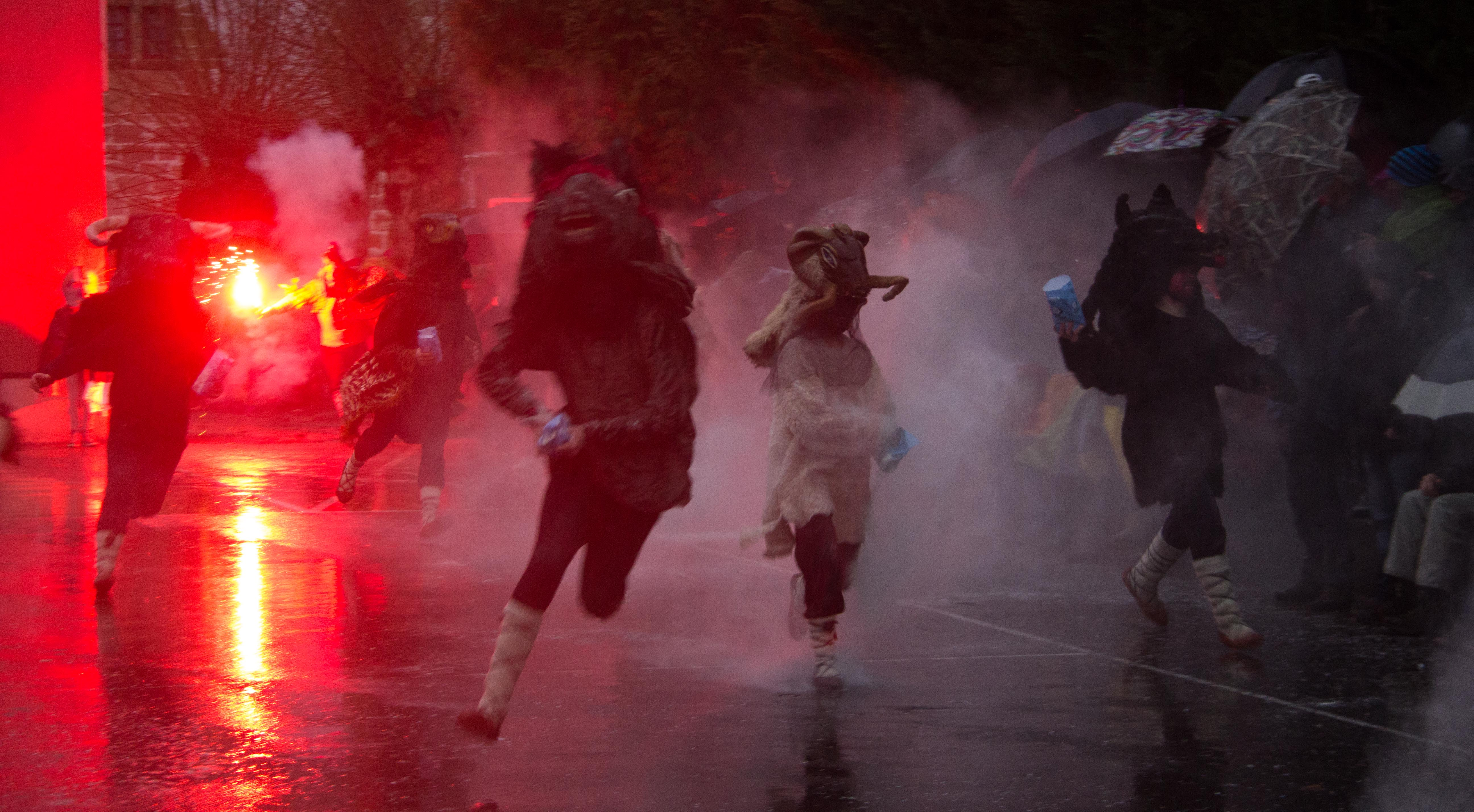 Uztaritzeko inauteriak 2014. Carnaval d'Ustaritz. Abereen dantza Uztaritzeko inauteria 2014. Carnaval Ustaritz 2014